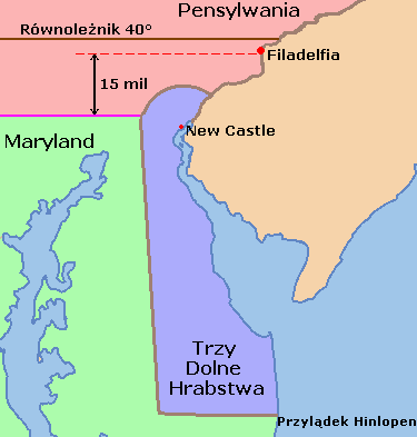 Faktyczne granice, które powstały na skutek Traktatu z 1732